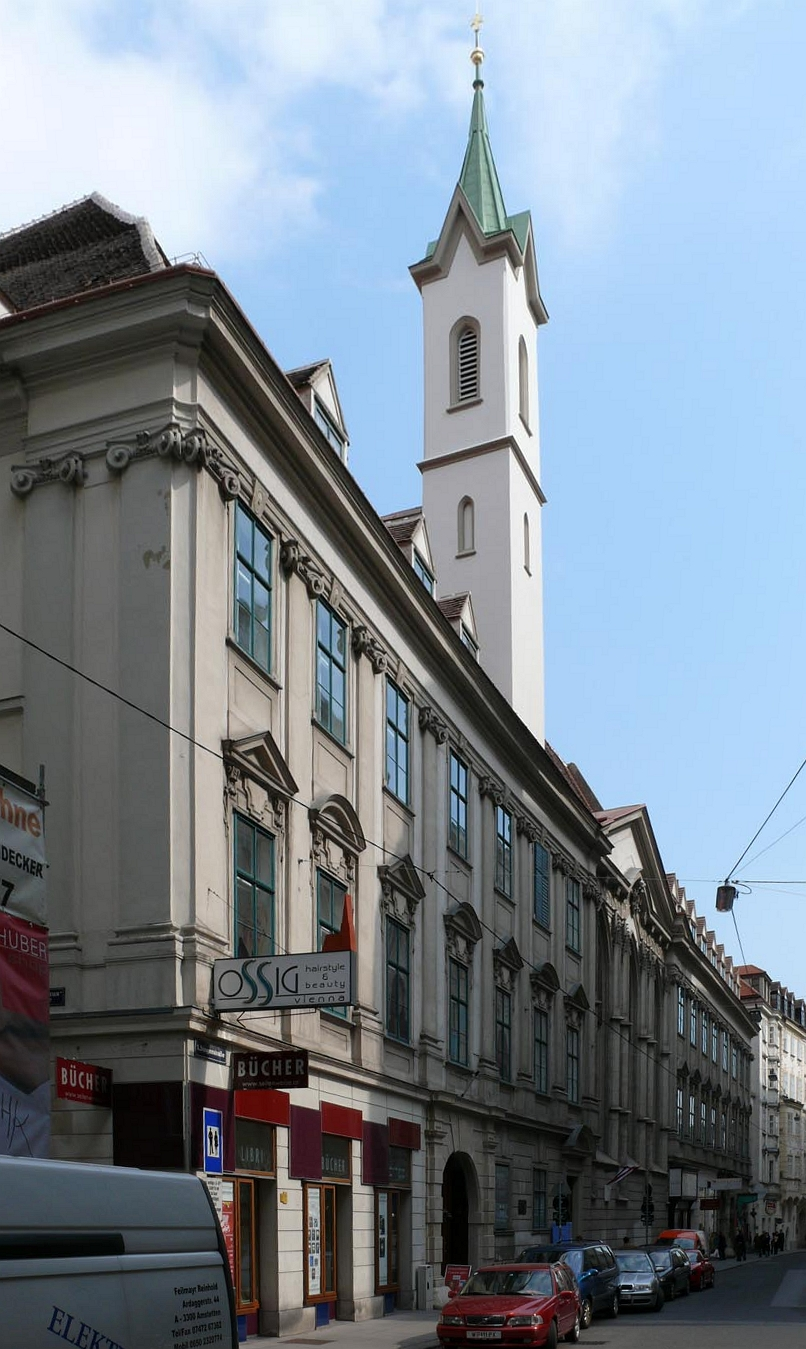 Deutschordenshaus